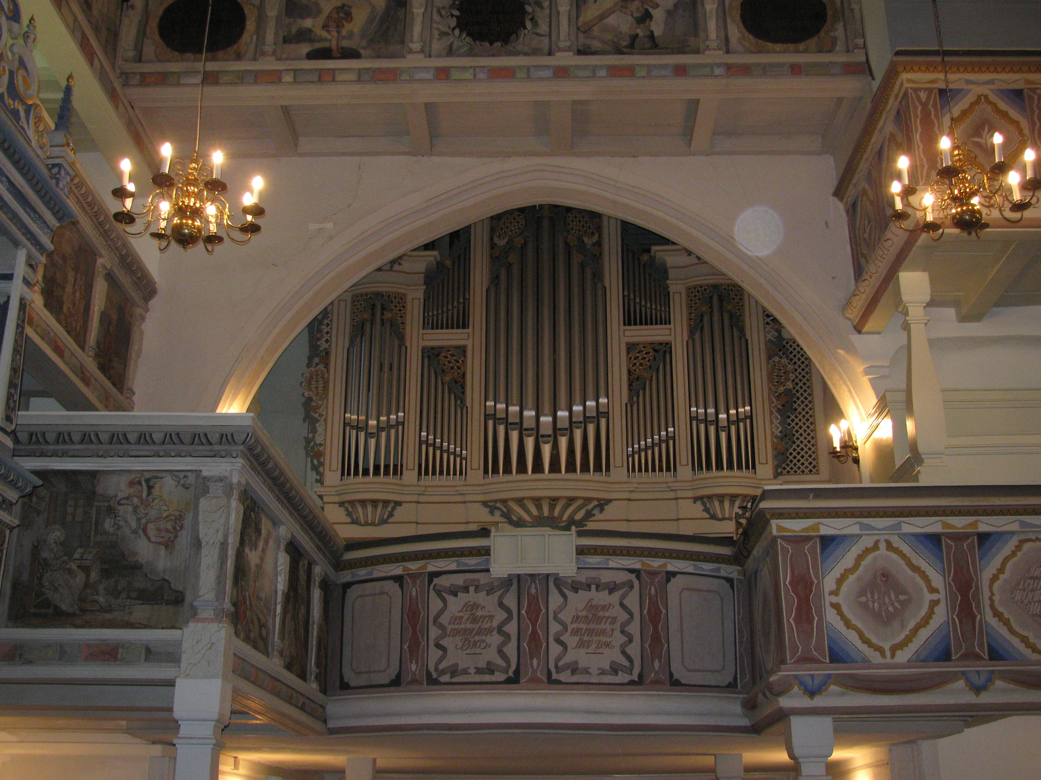 Leubnitzer Kirche Jehmlich-Orgel